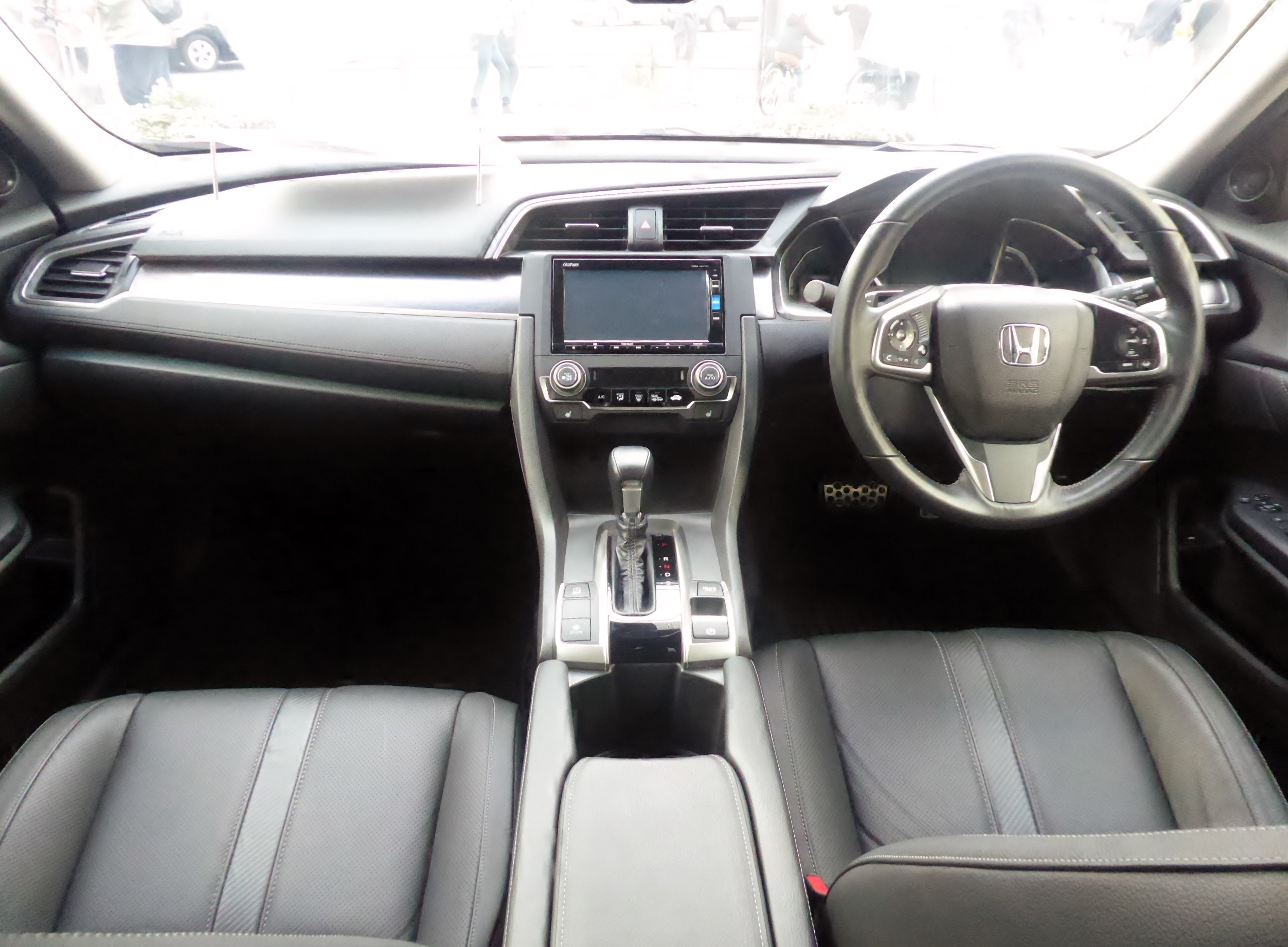 DBA-FC1型ホンダ・シビックセダンのインテリアを撮影。